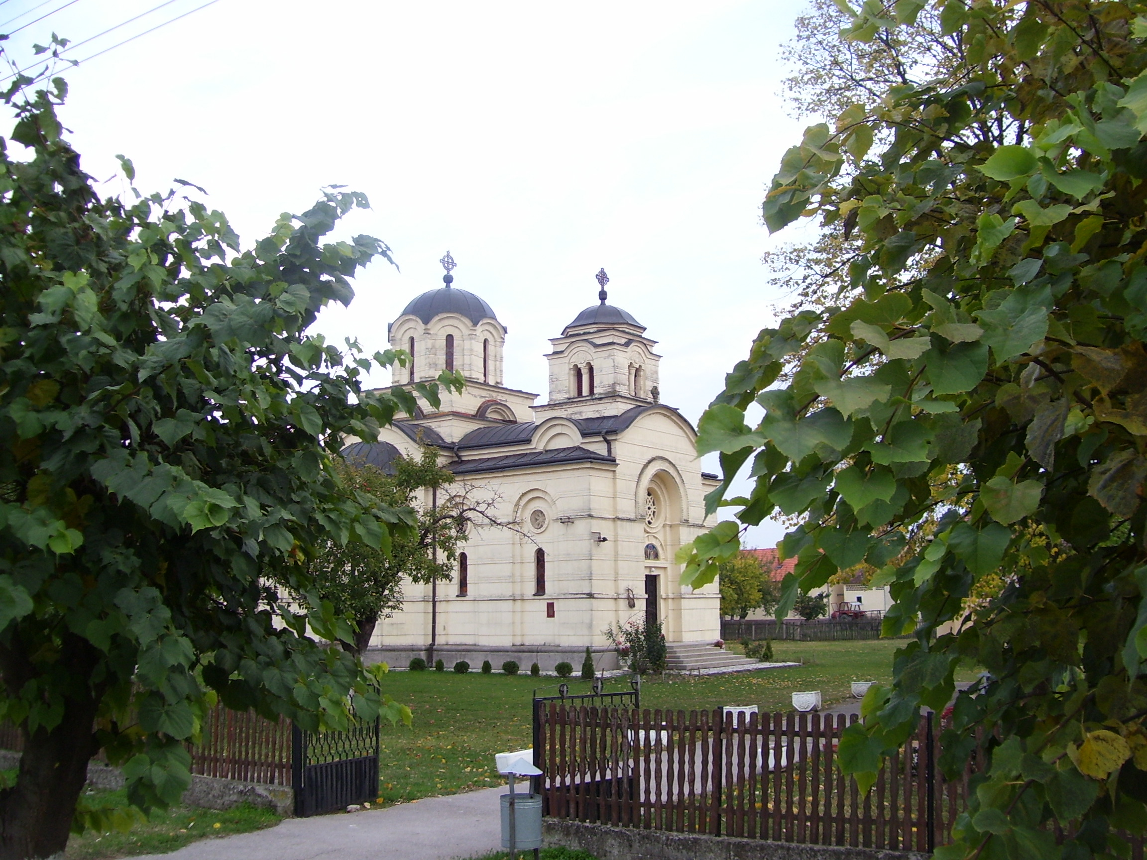 Аутор слике је корисник:SRB Maric IT Слика је урађена обичним фотоапаратом. Датум: 27-10-2011.